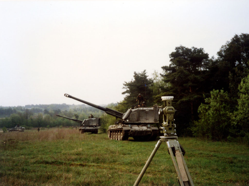 Théodolite Wild T16 en station pour l'amélioration de la direction des canons automoteurs AMX AuF1 Auteur: PhY - Avril 1989